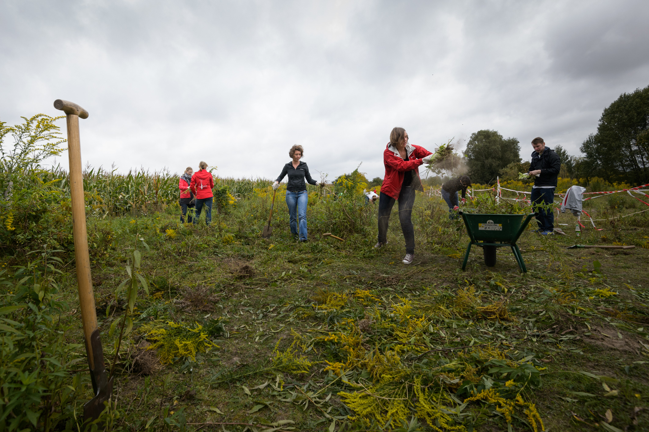 Nachhaltigkeitswoche 2014 im Naturpark Barnim: Corporate-Volunteering-Einsatz (organisiert über EUROPARC Deutschland) am Rande eines Maisfelds (Entfernen von Neophyten/Goldruten?)